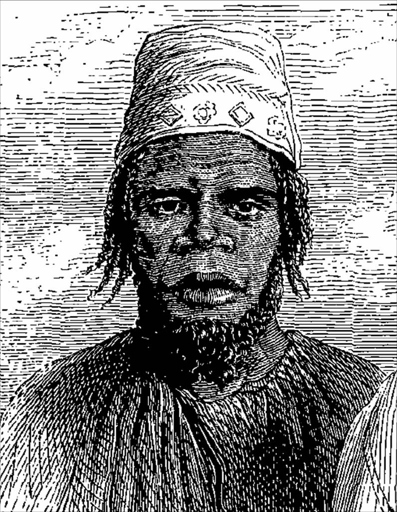 "Djalonké" (Types et portraits) dans Le Tour du monde, 1861 (3 / 1e semestre), p. 393